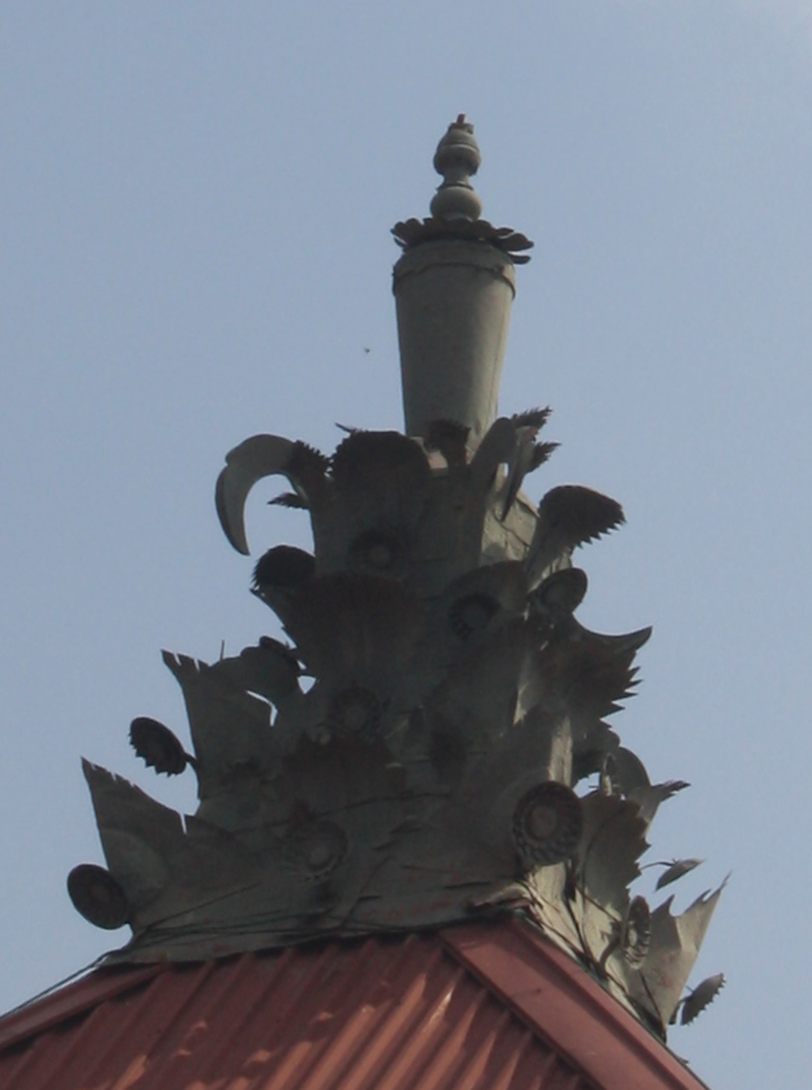 Kubah yang ada di masjid Agung Yogyakarta Jawa Tengah Indonesia